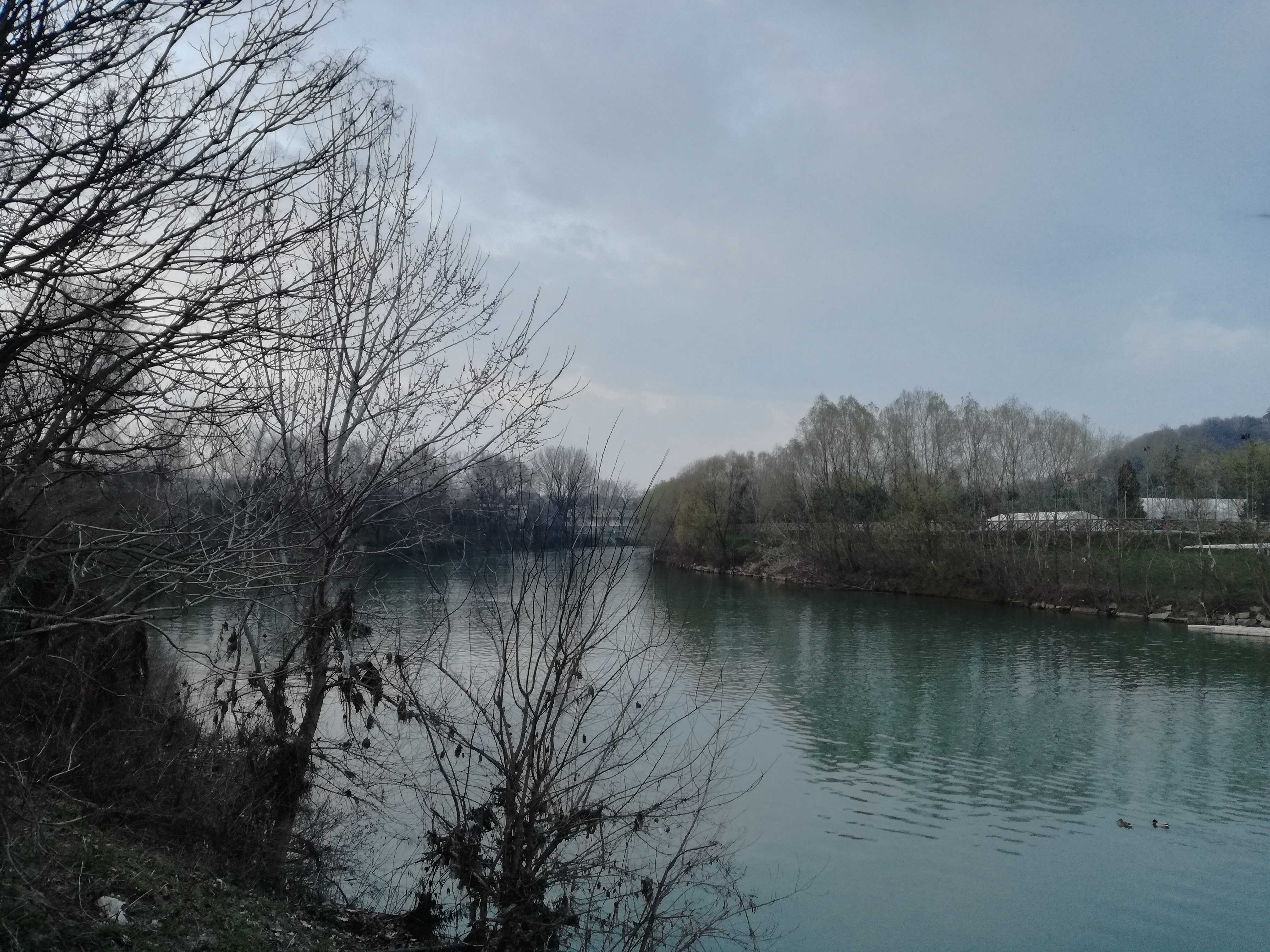 Parco Le Vallere, affluenza